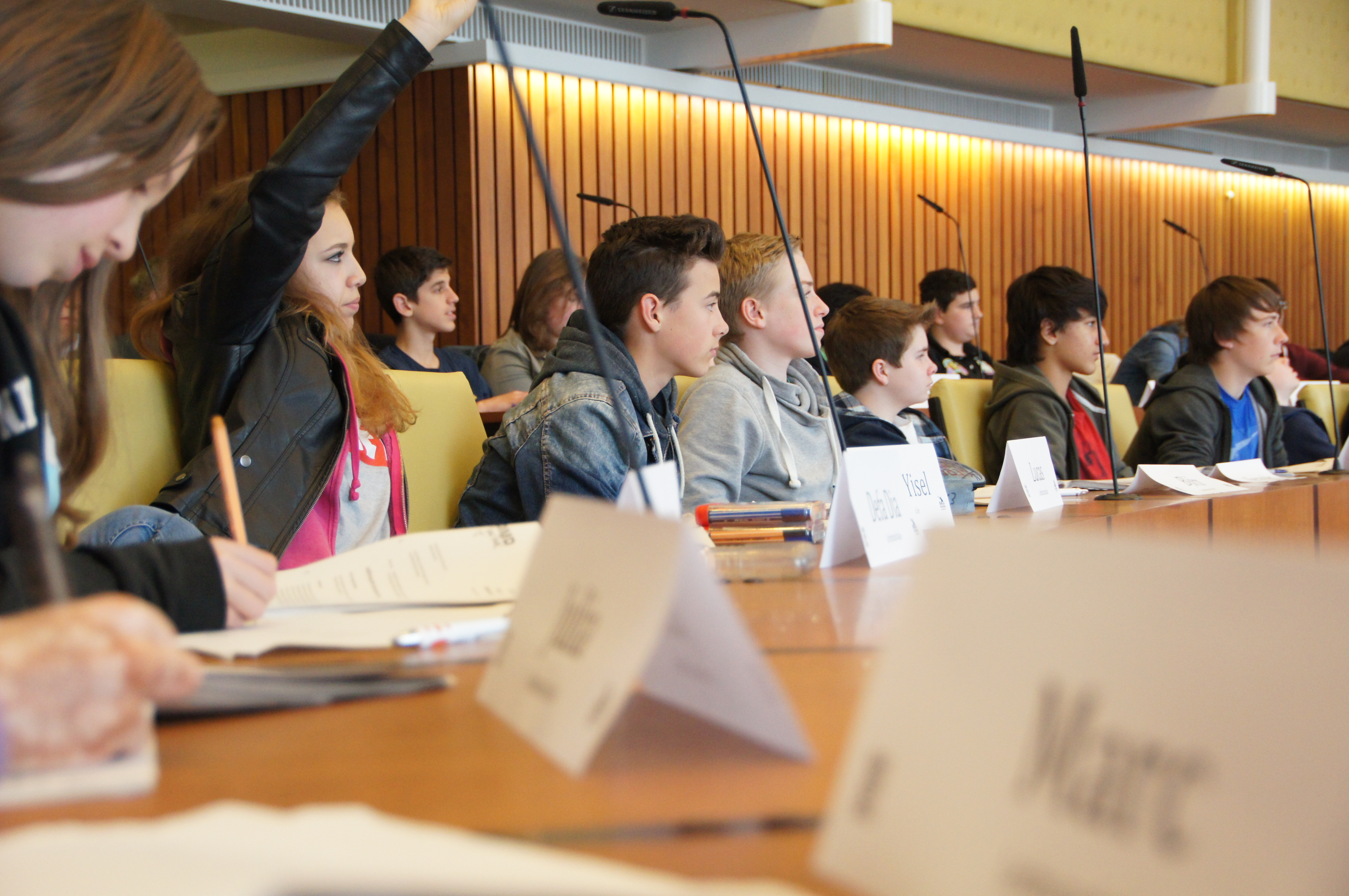 Pimp Your Town! ist ein Planspiel, in dem SchülerInnen in Zusammenarbeit mit der Landeshauptstadt Hannover, Kommunalpolitik erleben können.